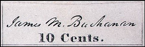 Почтовая марка США, BALTIMORE_MD. Scott №3X4